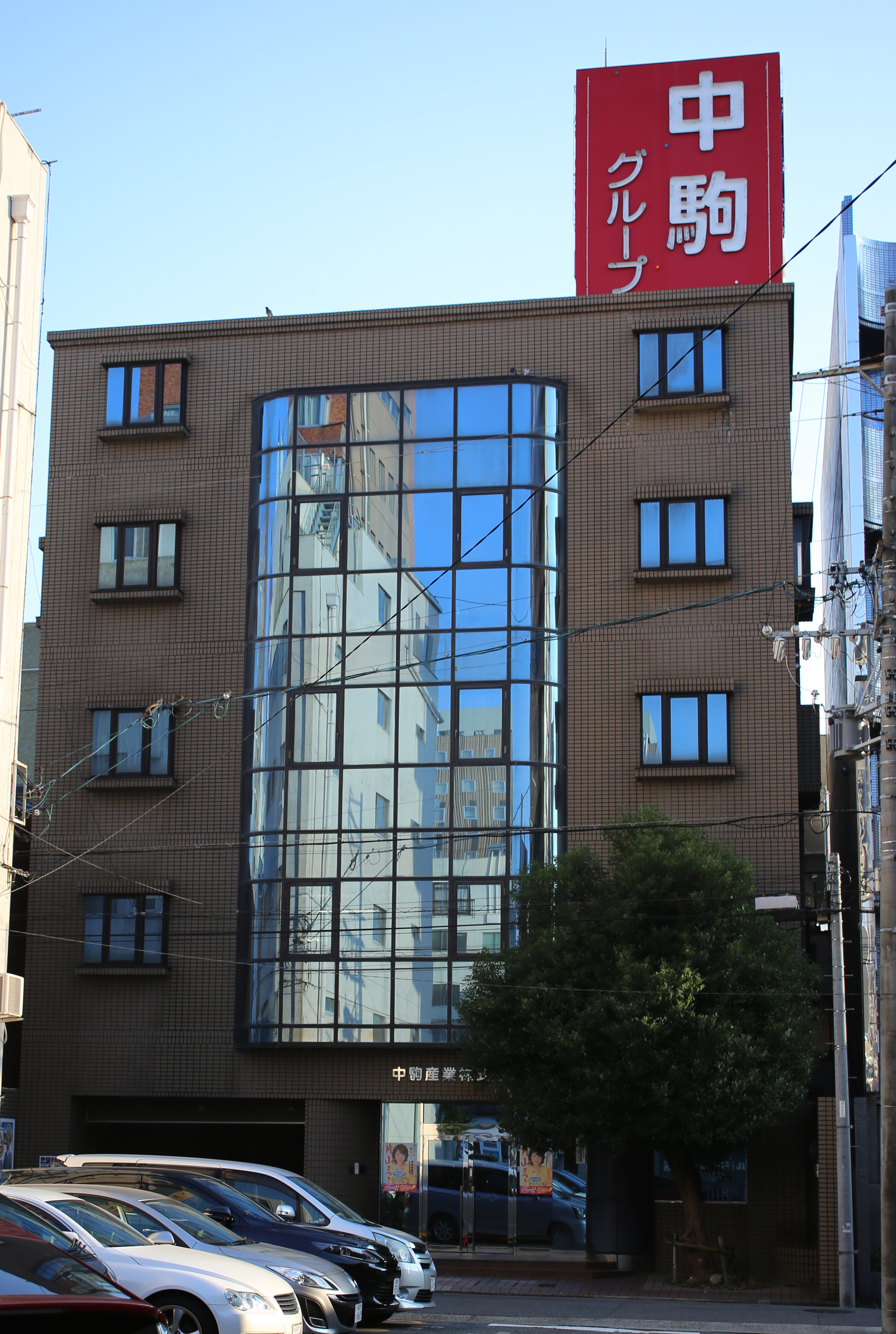 名古屋市中村区太閤四丁目の中駒産業本社を北側公道より撮影